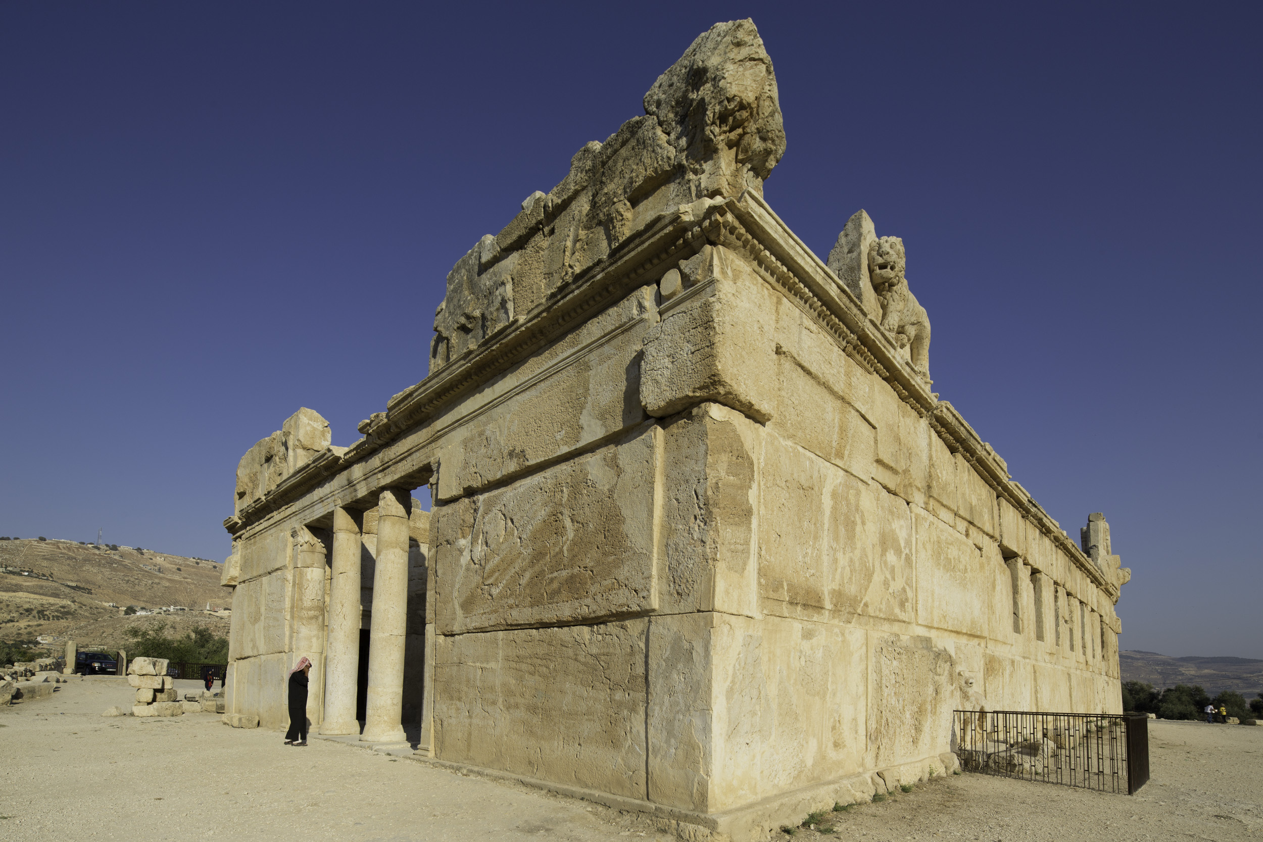 Iraq al-Amir